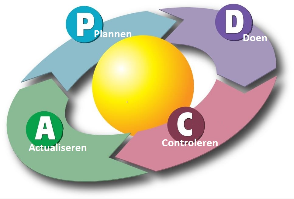 Demings kwaliteitscirkel. Even snel in elkaar geknutseld door SanderSpek